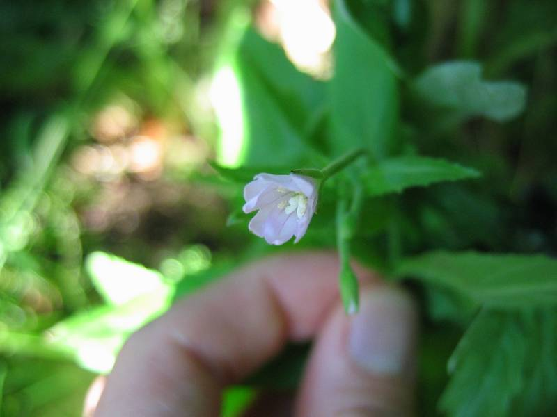 Wald-Weidenröschen Epilobium montanum fo. albiflora.